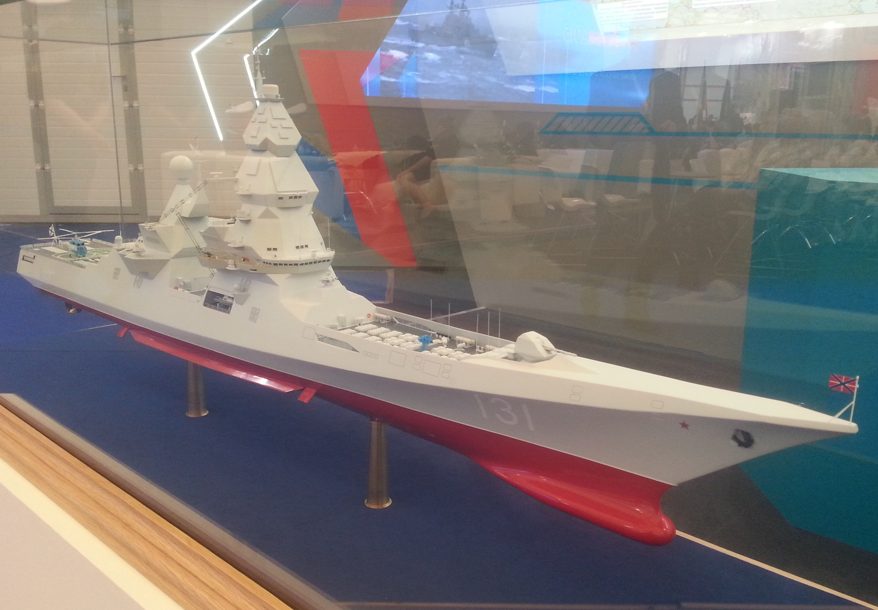 Макет эсминца проекта 23560 (шифр «Лидер») на выставке «Армия 2015»